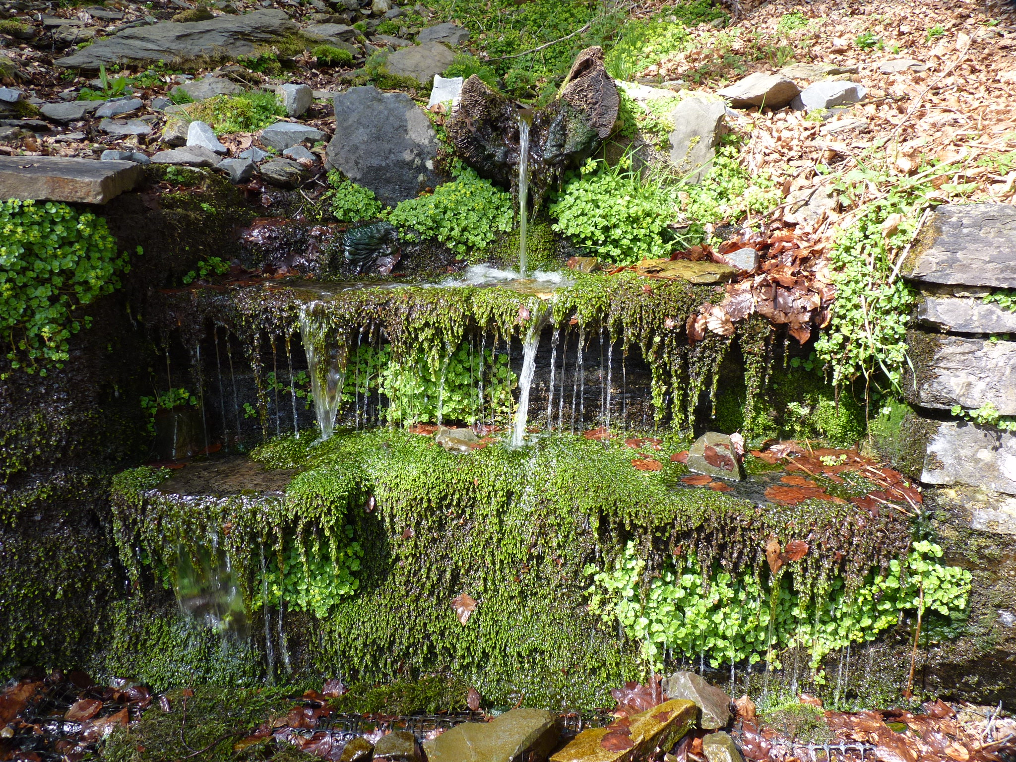 Die Sombornquelle im April 2014